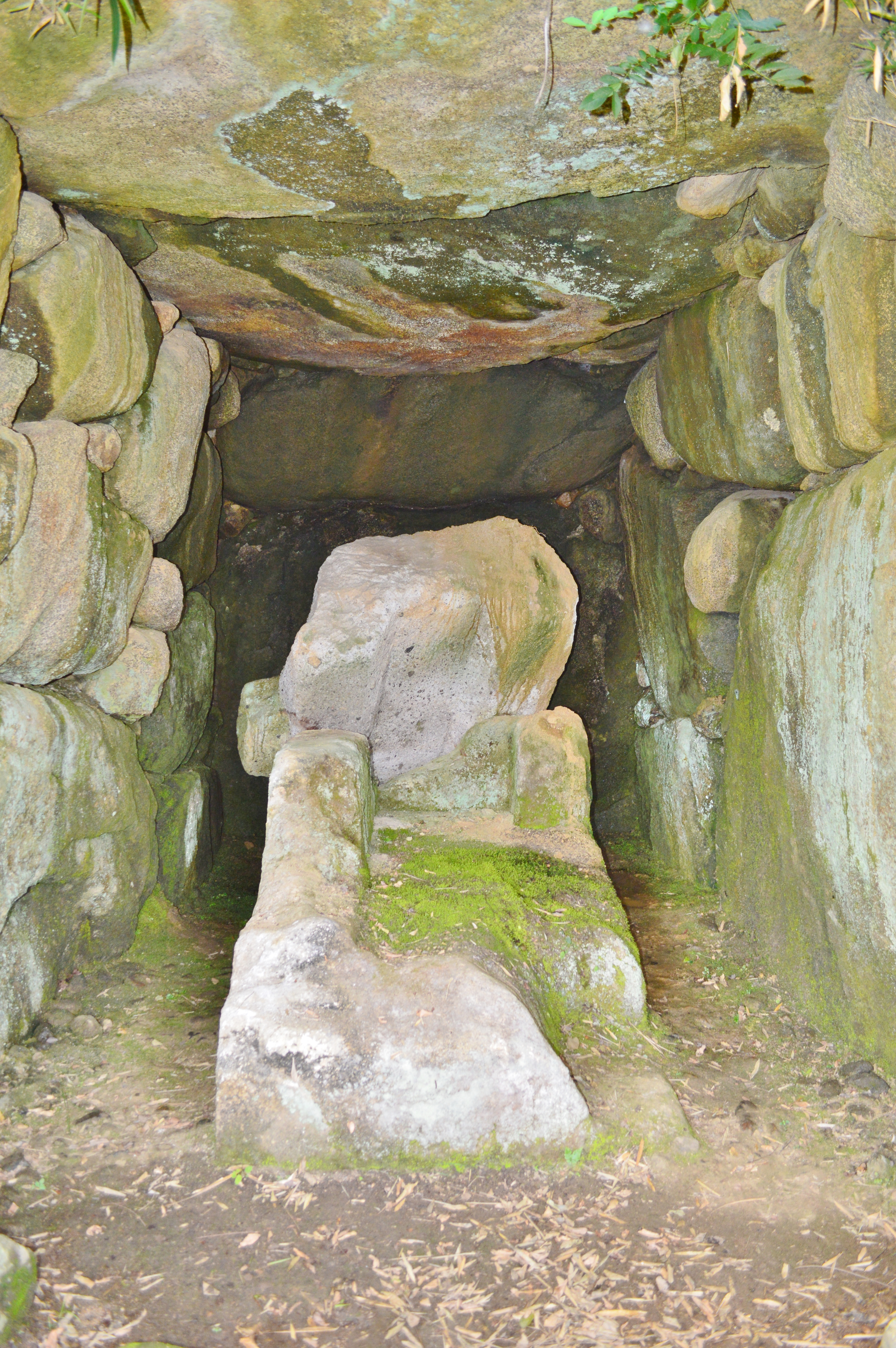 ツボリ山古墳 石室玄室